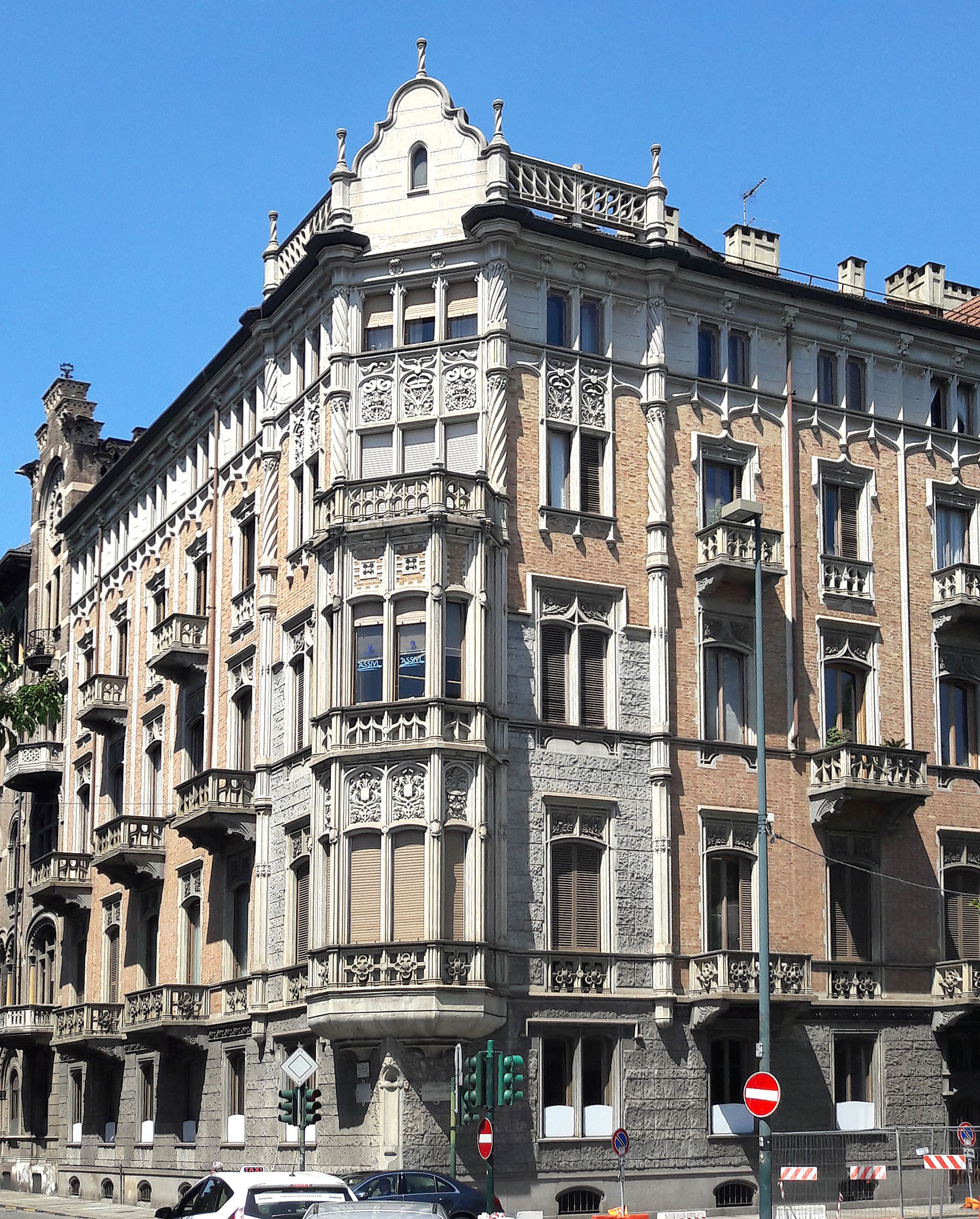 Liberty a Torino - Edificio eclettico-neogotico G. Gatti 1904